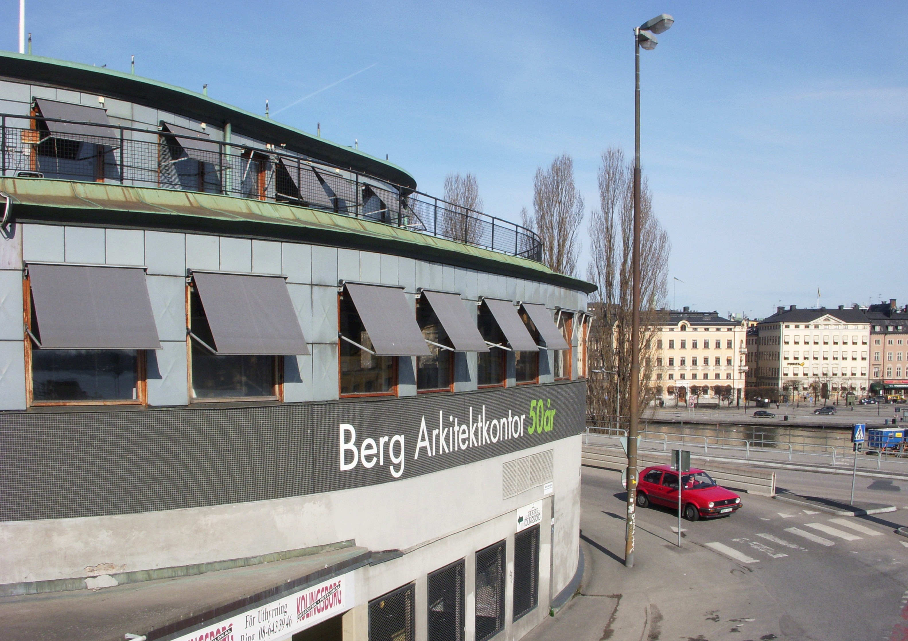 Kolingsborg i april 2009